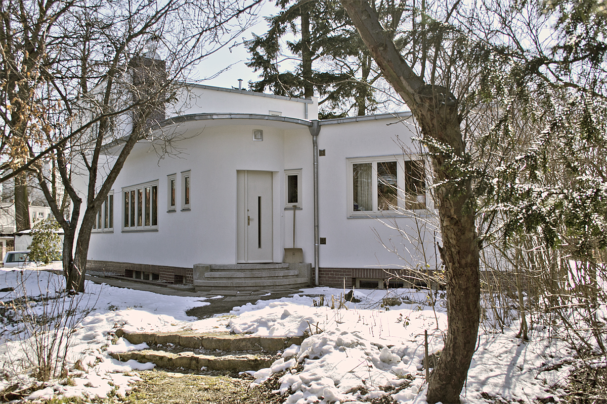 Dom nr 37 z wystawy WuWA przy ul. Zielonego Dębu 21